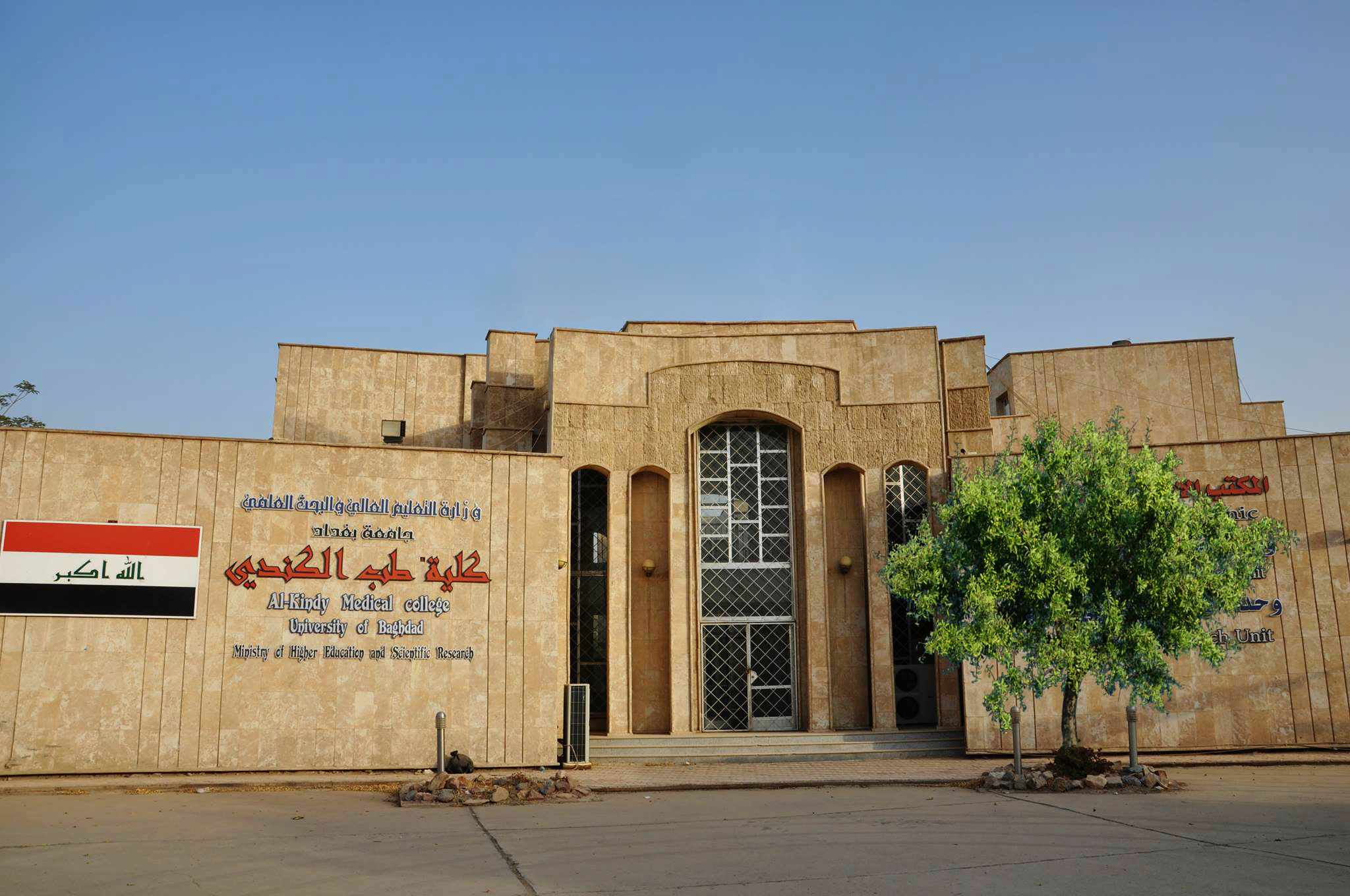 كلية طب الكندي